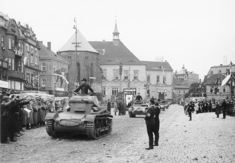 Heeres-Filmstelle. Bildabt. Einmarsch in das Sudetenland. Panzerkraftwagen im Vorbeimarsch auf dem Adolf Hitler-Platz. German tanks drive across the Adolf Hitler square in Komtau. 9.10.1938 Komotau, Sudetenland Information added by Wikimedia users.